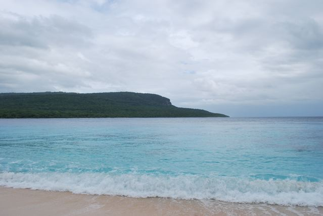 Blick auf die Küste vor Lene Hara von Jaco aus